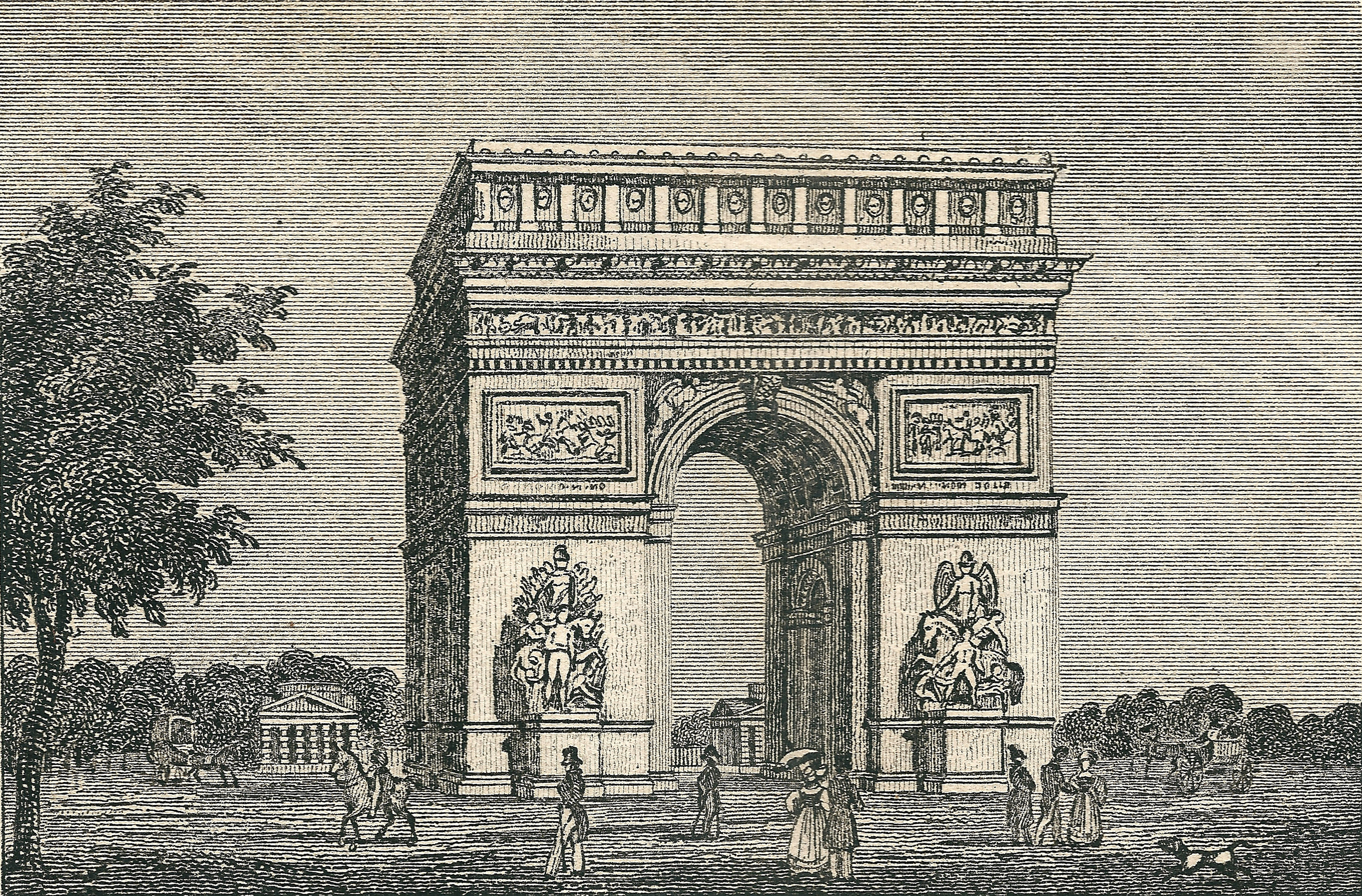 Un des dessins du Guide de Paris de 1848, par Albert Montémont : l'Arc de triomphe de l'Etoile.